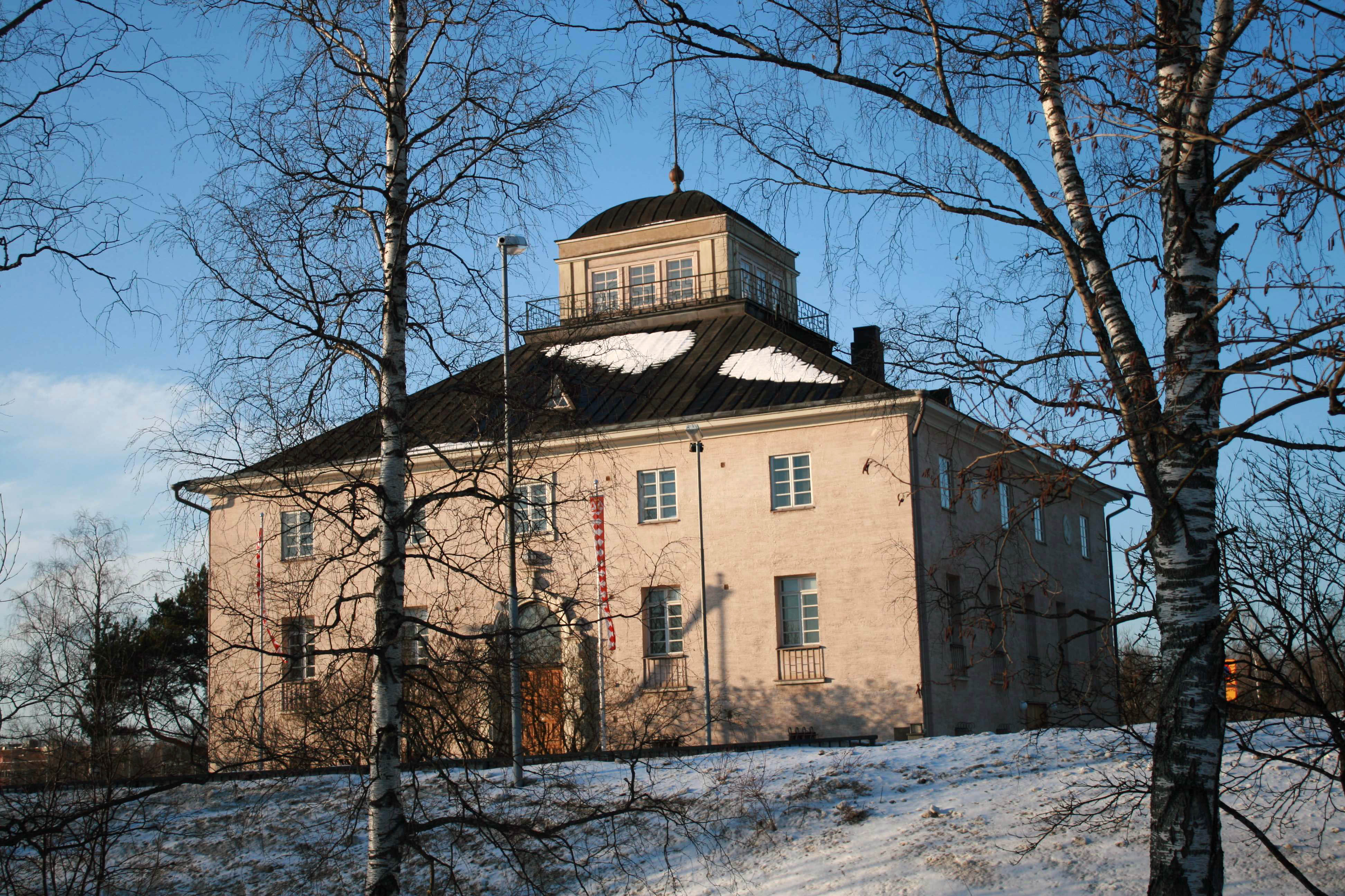 Pielisjoenlinna, castle of river Pielisjoki Joensuu